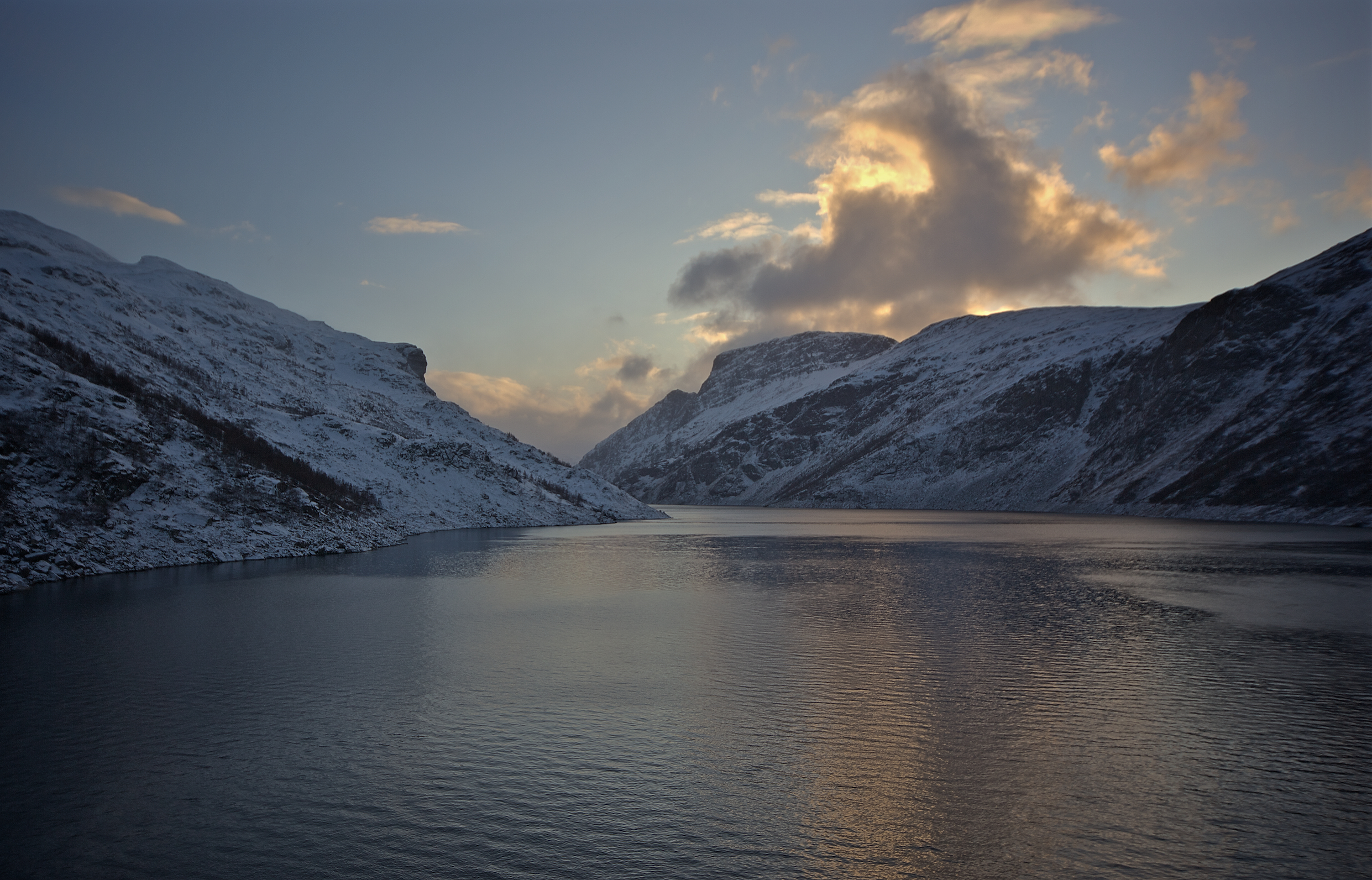 Fretheimsdalsvatnet i Aurland kommune